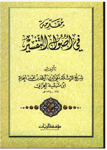 غلاف كتاب